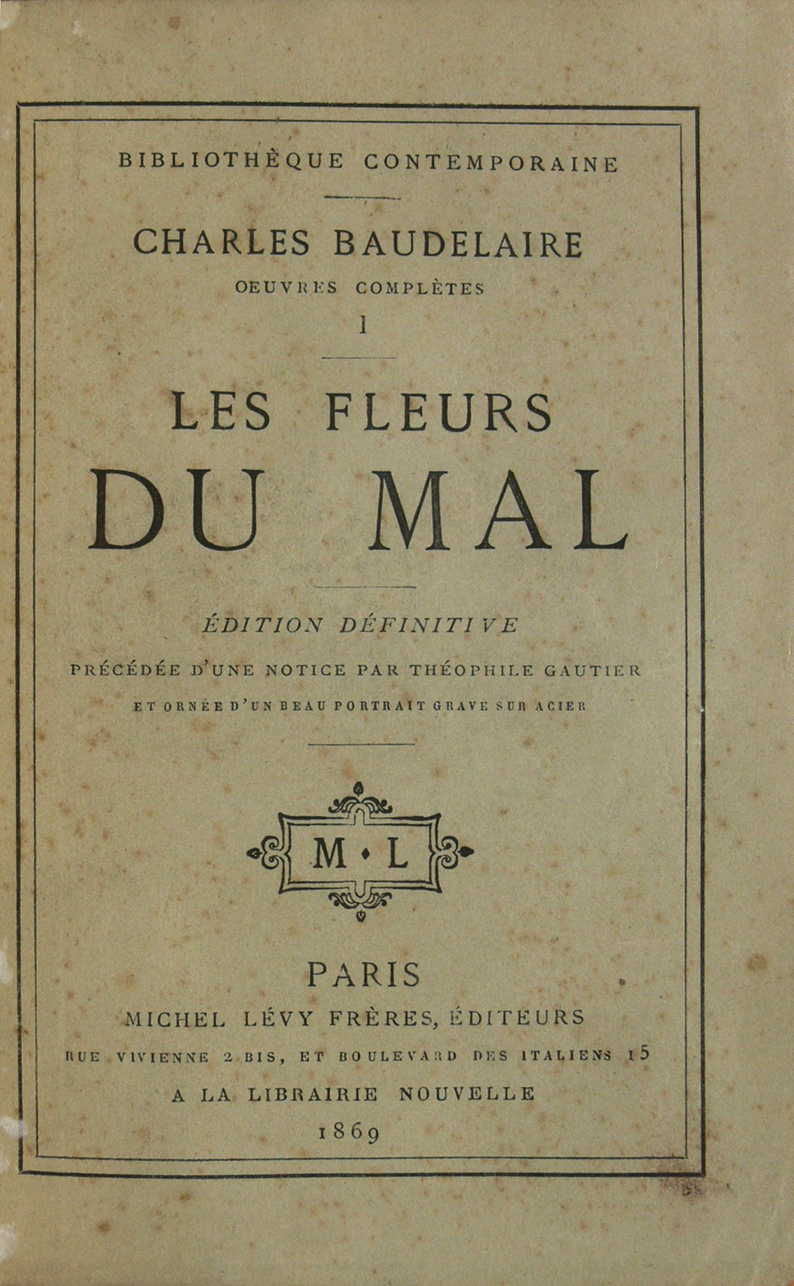 Fleurs du Mal - 3re édition (1869)